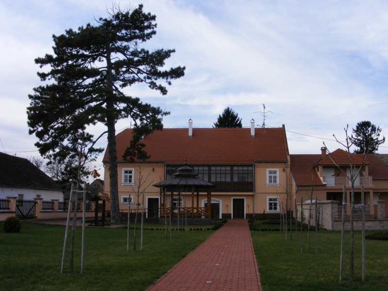 Rodna kuća Milutina Milankovića u Dalju